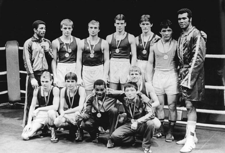 ADN-ZB Lehmann 1.4.84 Halle: XIII. Chemie-Pokalturnier im Boxen - Die Sieger der einzelnen Gewichtsklassen stellten sich den Bildreportern. Untere Reihe vlnr: Mike Knuth, Andreas Zülow (beide DDR), Jesus Sollet (Kuba), Kon Gil Rjon (KDVR) und Torsten Koch (DDR). Obere Reihe vlnr Carlos Garcia (Kuba), Michael Timm, Torsten Schmitz, Henry Maske (alle DDR), Alexander Beljajew (UdSSR, SASK Schwerin), Serik Umirbekow (UdSSR) und Teofilo Stevenson (Kuba).